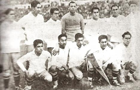 Selección de fútbol de Chile en la Copa Mundial de 1930. Arriba: Víctor Morales, Ernesto Chaparro, Guillermo Saavedra, Roberto Cortés, Arturo Torres y Casimiro Torres. Abajo: Juan Aguilera, Carlos Vidal, Eberardo Villalobos, Guillermo Subiabre y Guillermo Arellano.